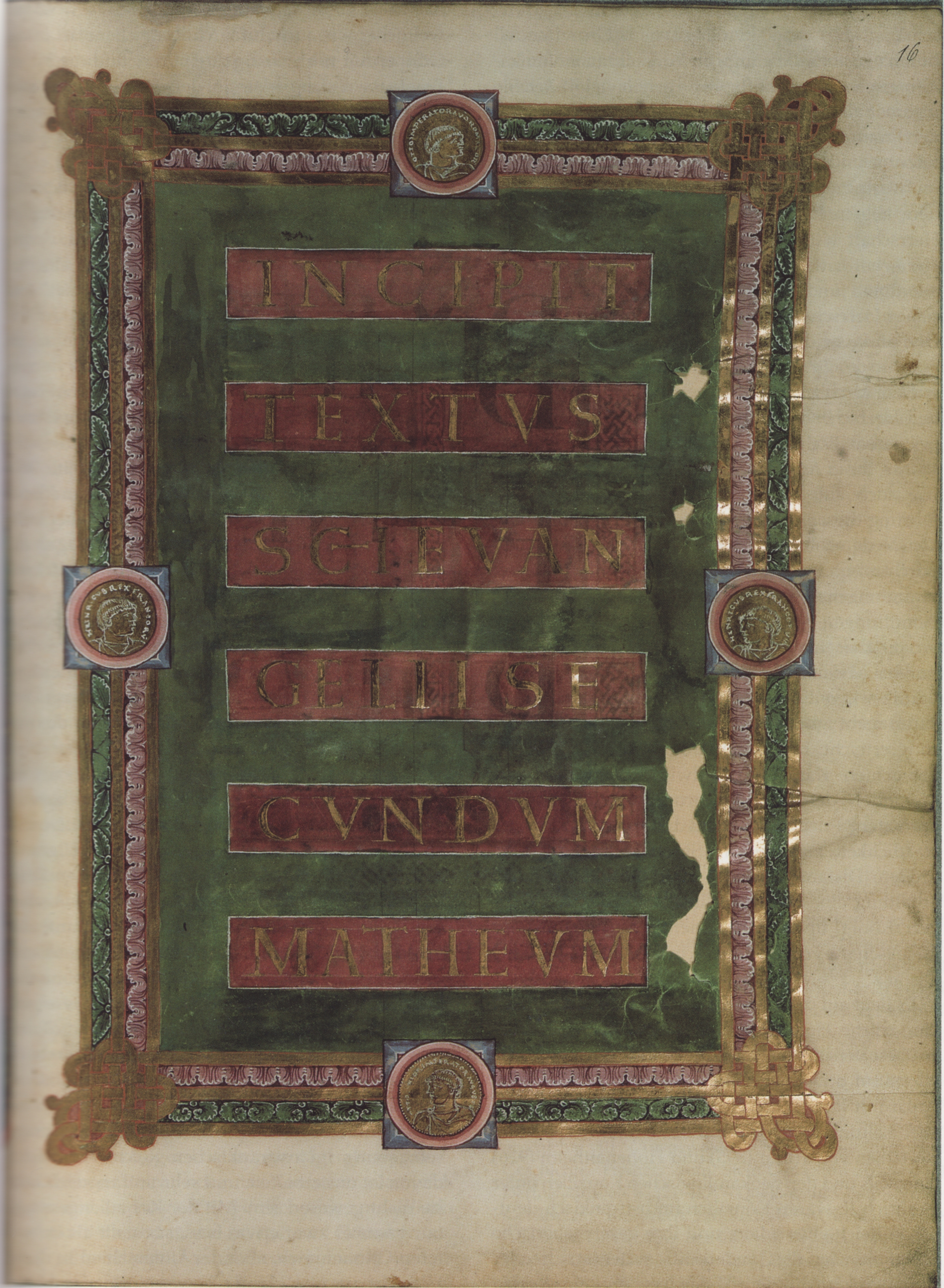 Zierseite zum Matthäusevangelium im Evangeliar der Saint Chapelle. In den runden Medaillions Büsten von je 2 Ottonen namens Otto und 2 namens Heinrich. Paris, Bibliothèque nationale de France, lat. 8851, fol. 16r